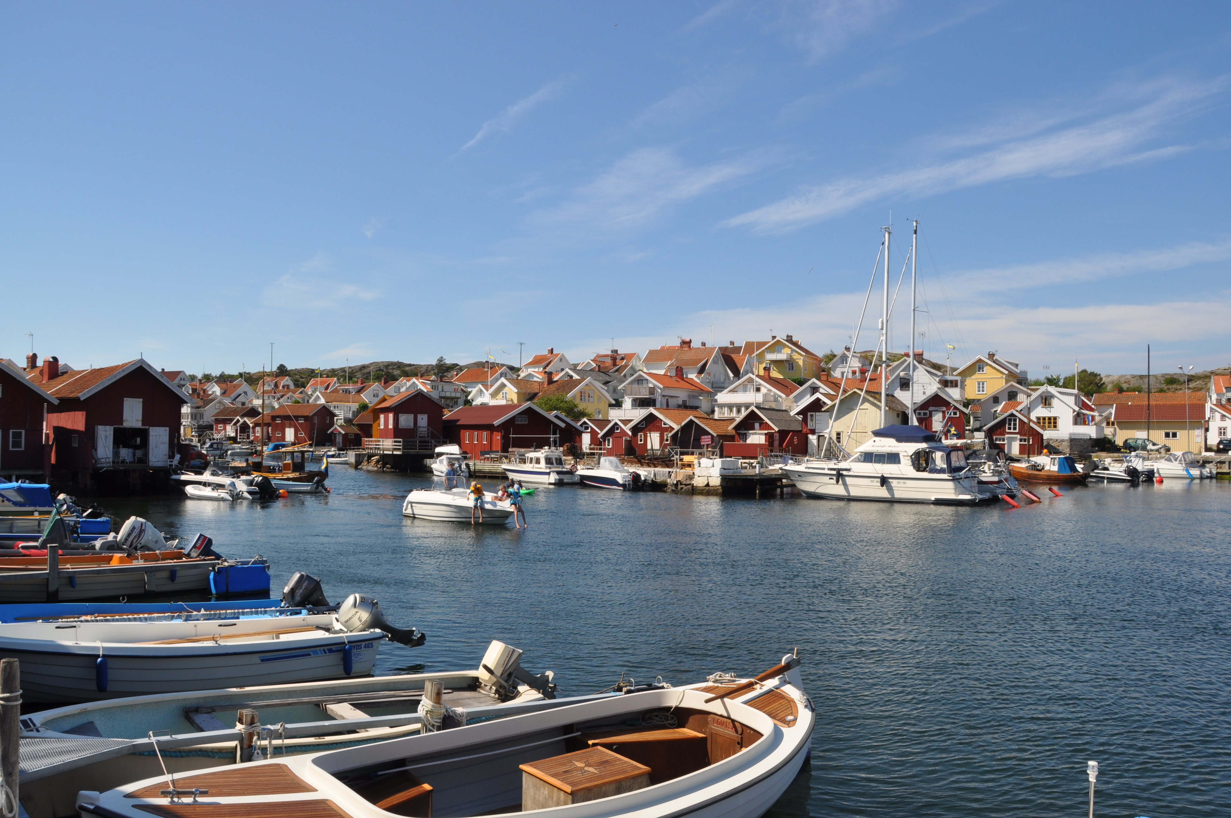 Grundsund